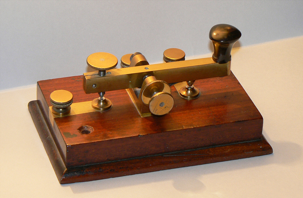 Clef télégraphique 1880. Fabrication L. Mors Paris. coll. F6BLK